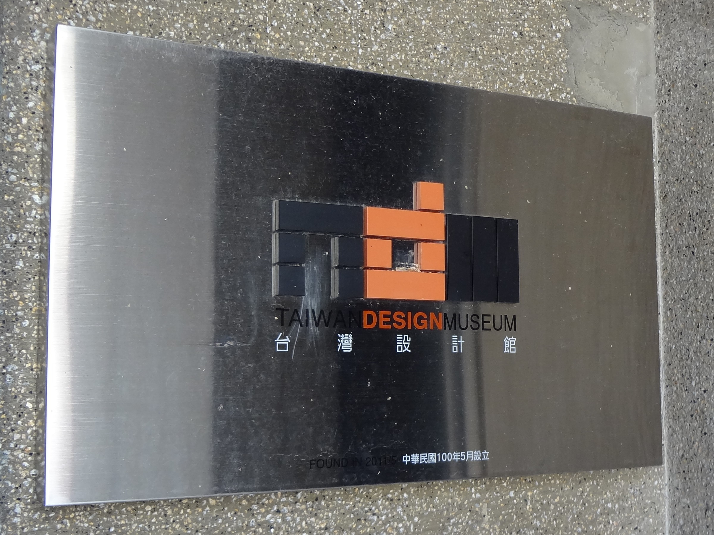 臺北市松山文化創意園區台灣設計館銘板，位於台灣設計館大門右側。